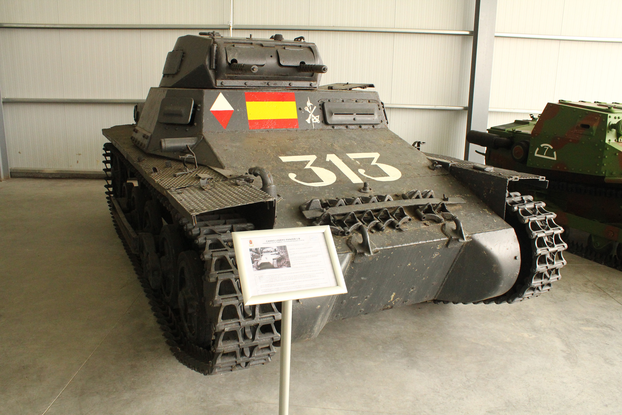 Carro ligero Panzerkampfwagen I (MG) Ausführung B, más conocido como Panzer IB y apodado en España como Carro Maybach, Negrillo o Tipo I. Fue construido en Alemania a partir de agosto de 1935. A España llegaron 132 unidades durante la Guerra Civil Española entre octubre de 1936 y enero de 1939, 72 aportados por la Legión Cóndor alemana y 50 conseguidos por medio de la sociedad Hispano-Marroquí de Transportes (HISMA), sirviendo todas las unidades en el bando nacional. Al terminar la contienda quedaban operativas 84 unidades. Armored Units Museum of El Goloso Light tank Panzerkampfwagen I (MG) Ausfrung B, better known as Panzer IB and nicknamed in Spain as Car Maybach, Negrillo or Type I. It was built in Germany from August 1935. To Spain arrived 132 units during the Spanish Civil War between October 1936 and January 1939, 72 provided by the German Condor Legion and 50 obtained ​​by the company Hispano-Moroccan of Transport (HISMA), serving all units in the national side. After the match 84 units were operational.